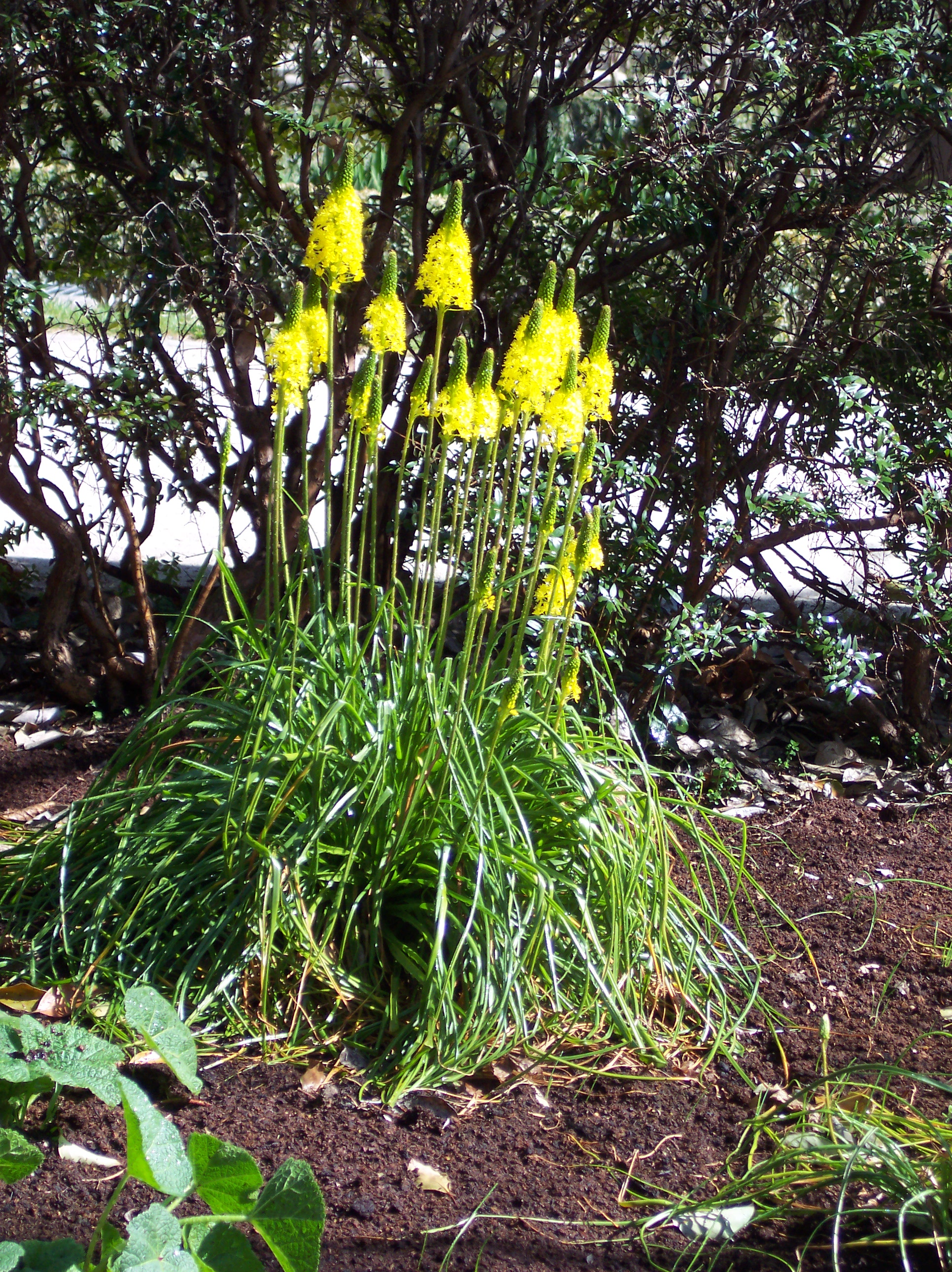 Bulbinella angustifolia. Real Jardín Botánico de Madrid.